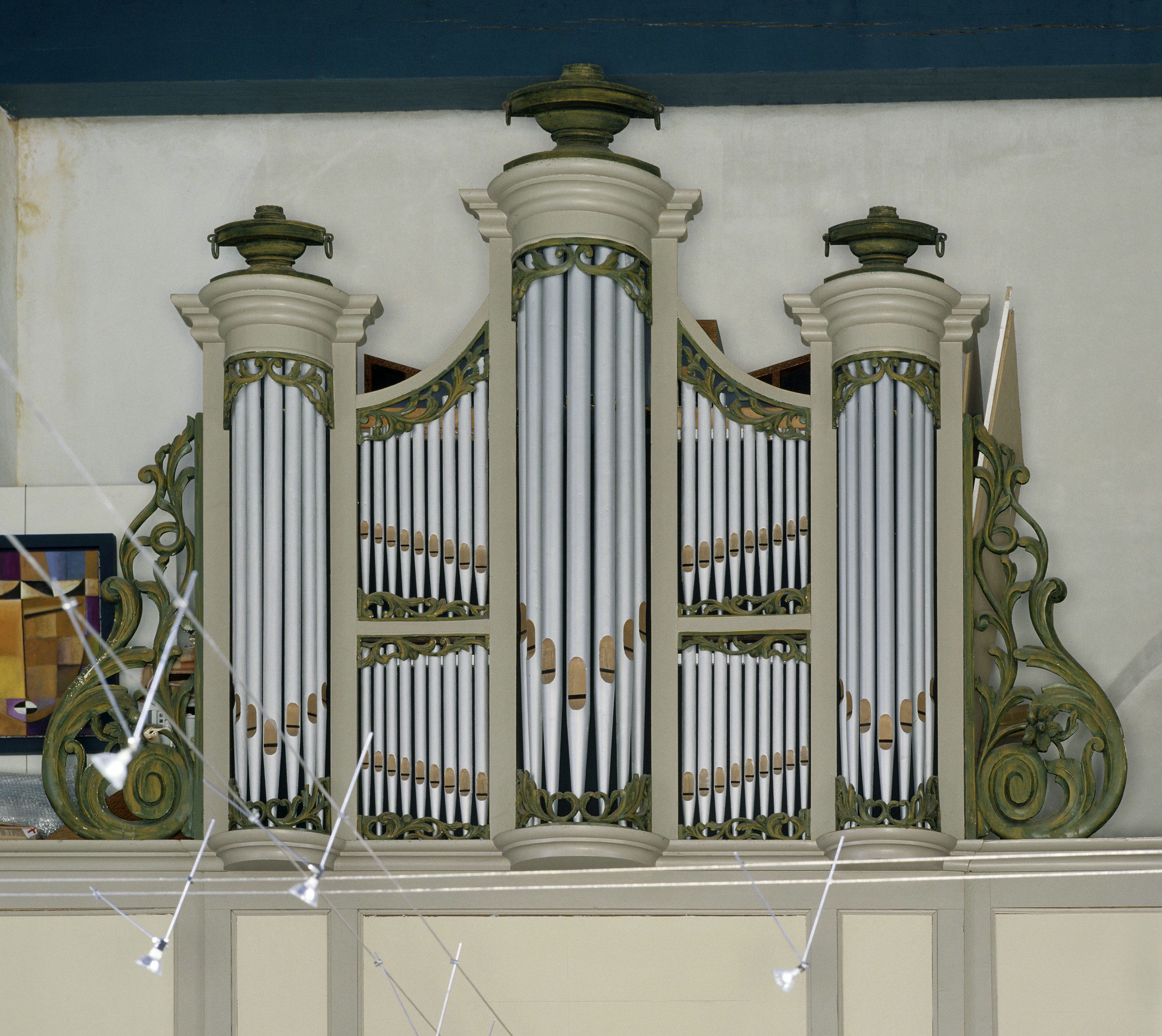 Hervormde Kerk: Interieur, aanzicht orgel, orgelnummer 1174 (opmerking: Gefotografeerd voor Het Historische Orgel in Nederland 1878-1886, Bladzijde 231)